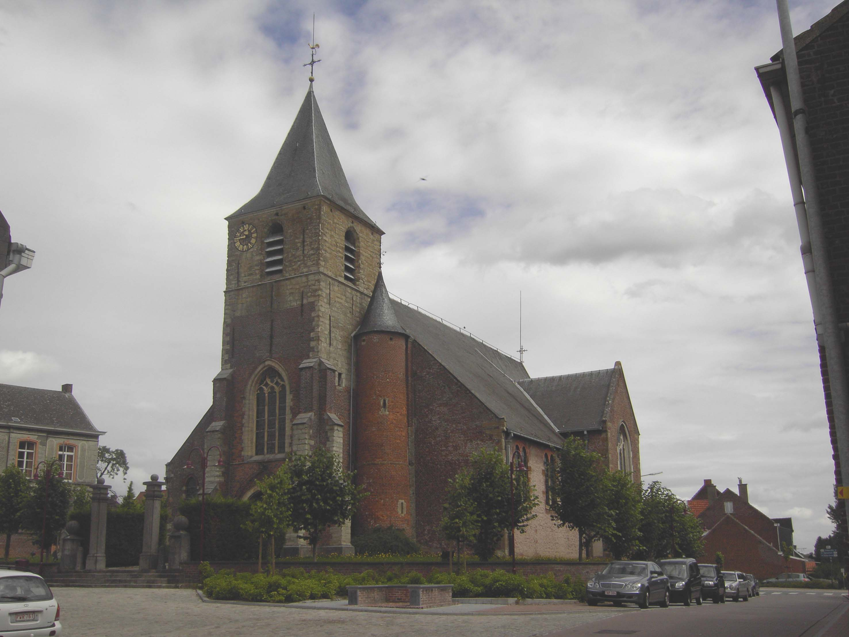 Kerk van Schendelbeke - Geraardsbergen - Oost-Vlaanderen - België